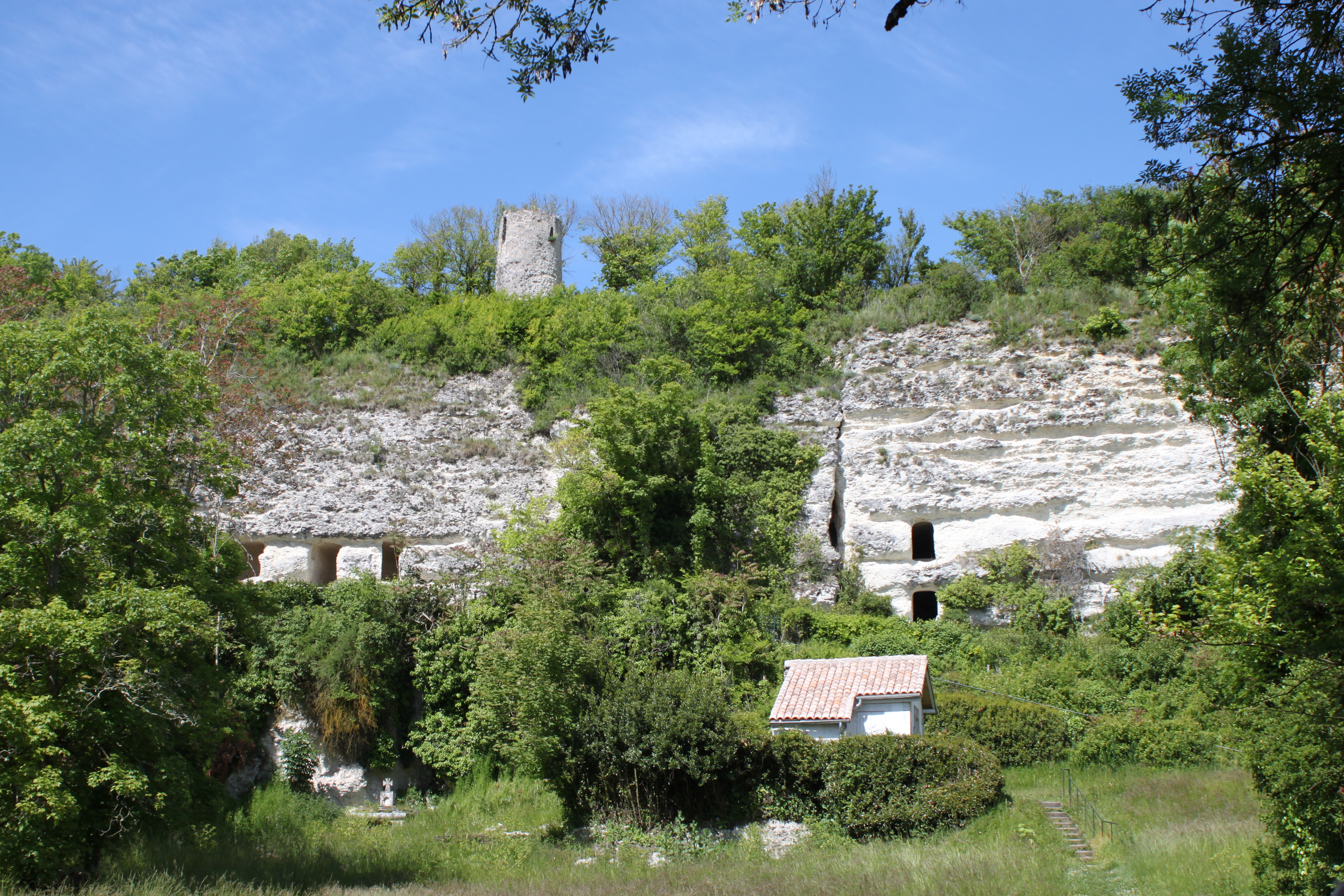 Falaise de l'ermitage Saint-Martial, Fr-17-Mortagne-sur-Gironde.